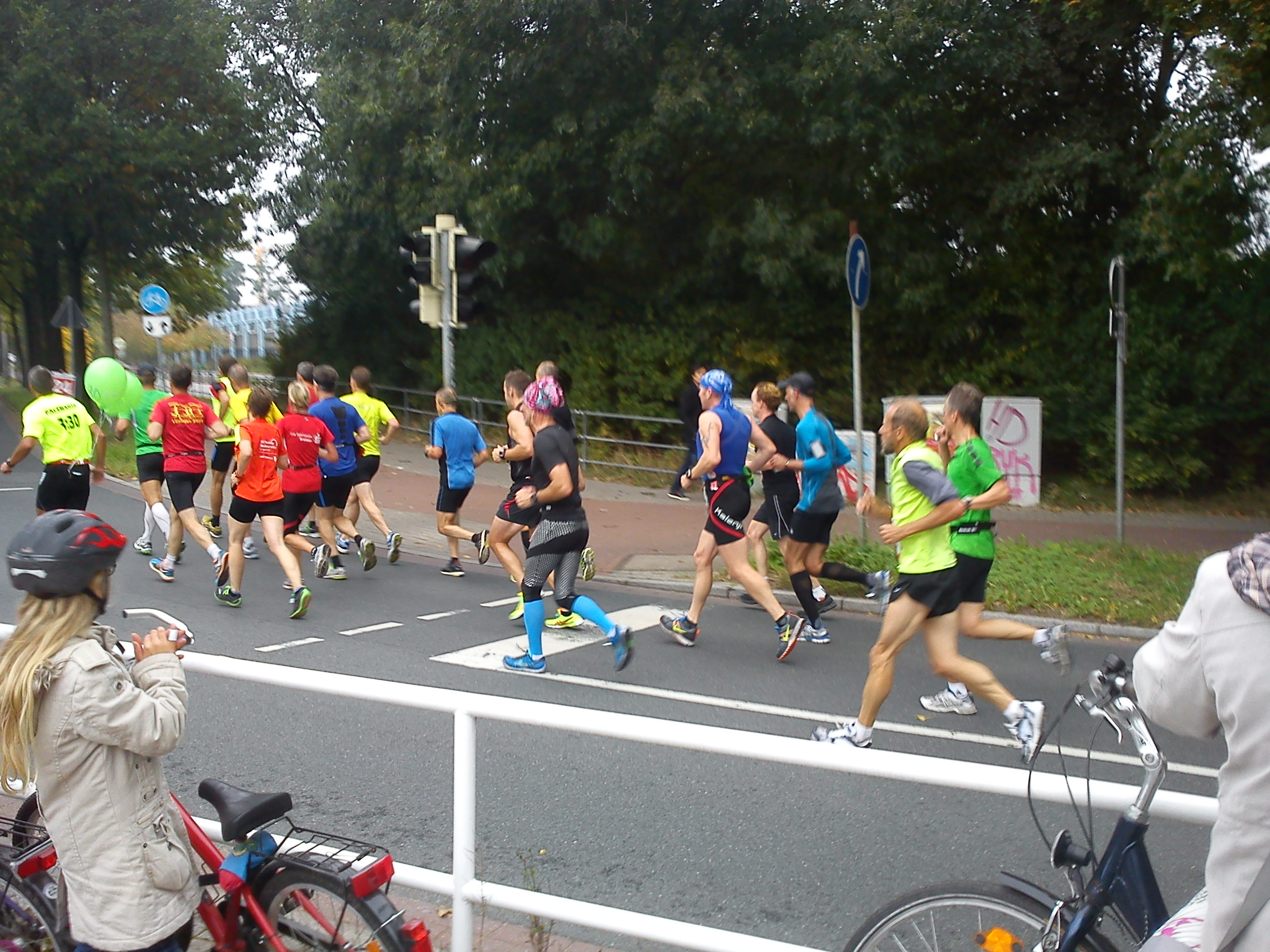 Start Bremen Marathon 2013